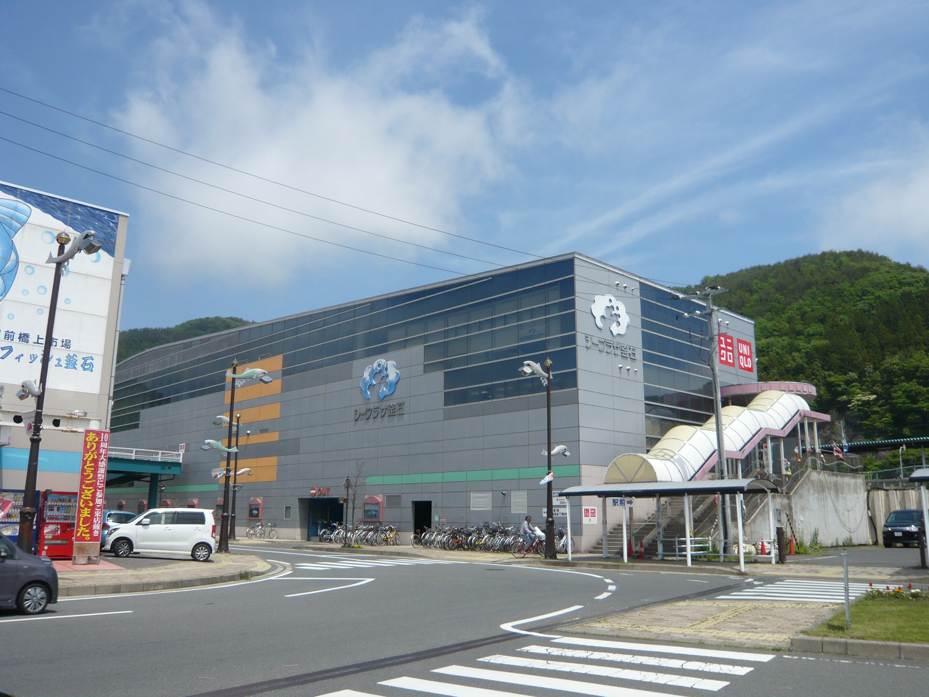 シープラザ釜石（2013年6月1日）